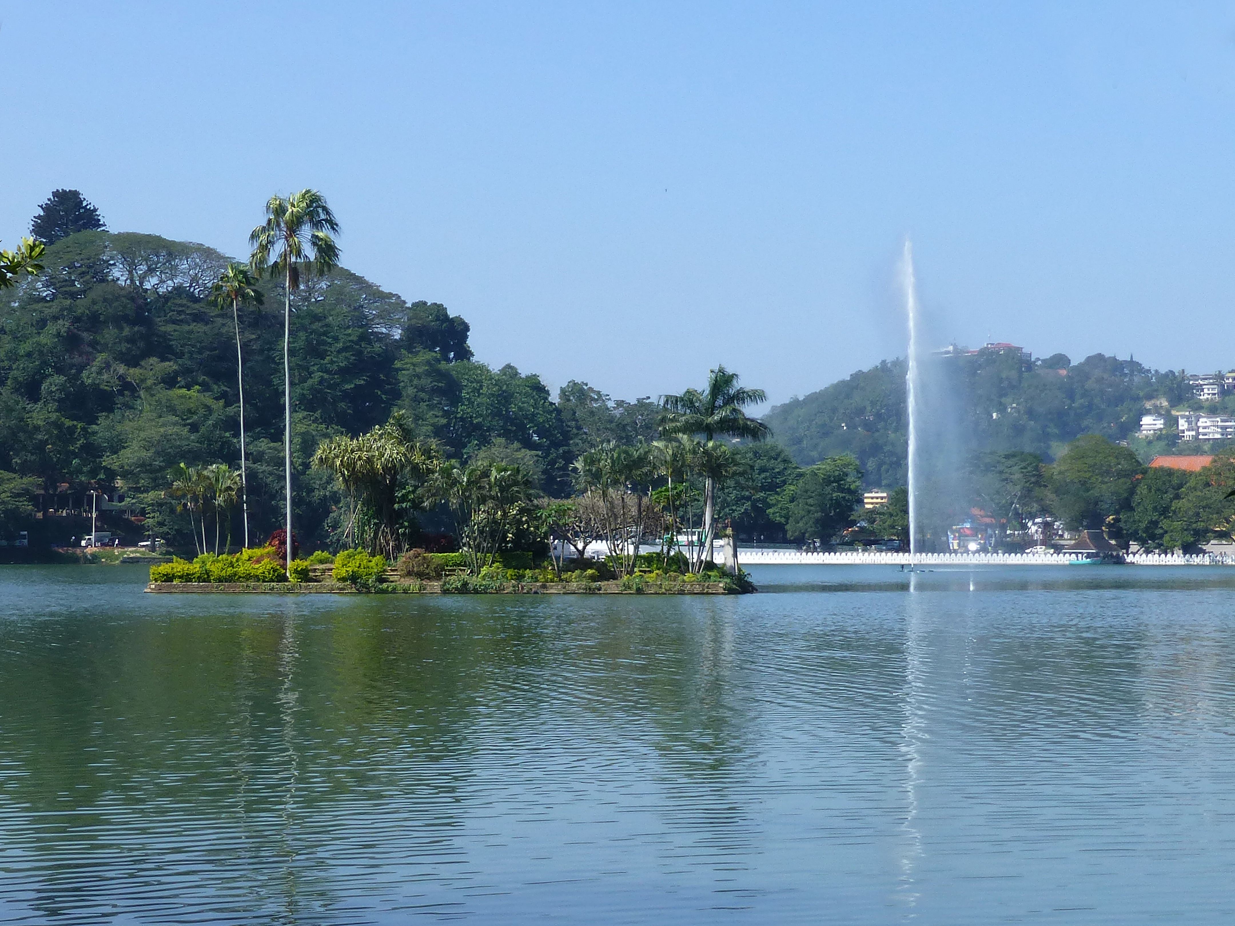 Lac de Kandy (Sri Lanka)